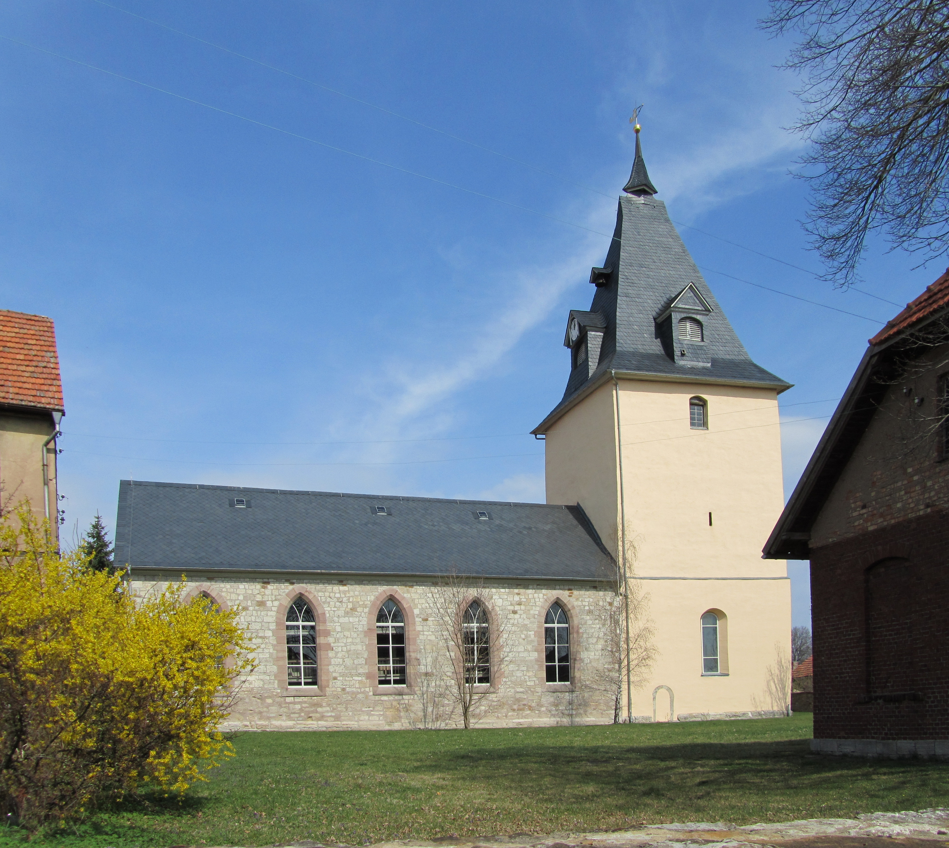 Die Kirche von Schernberg bei Sondershausen (Thüringen).